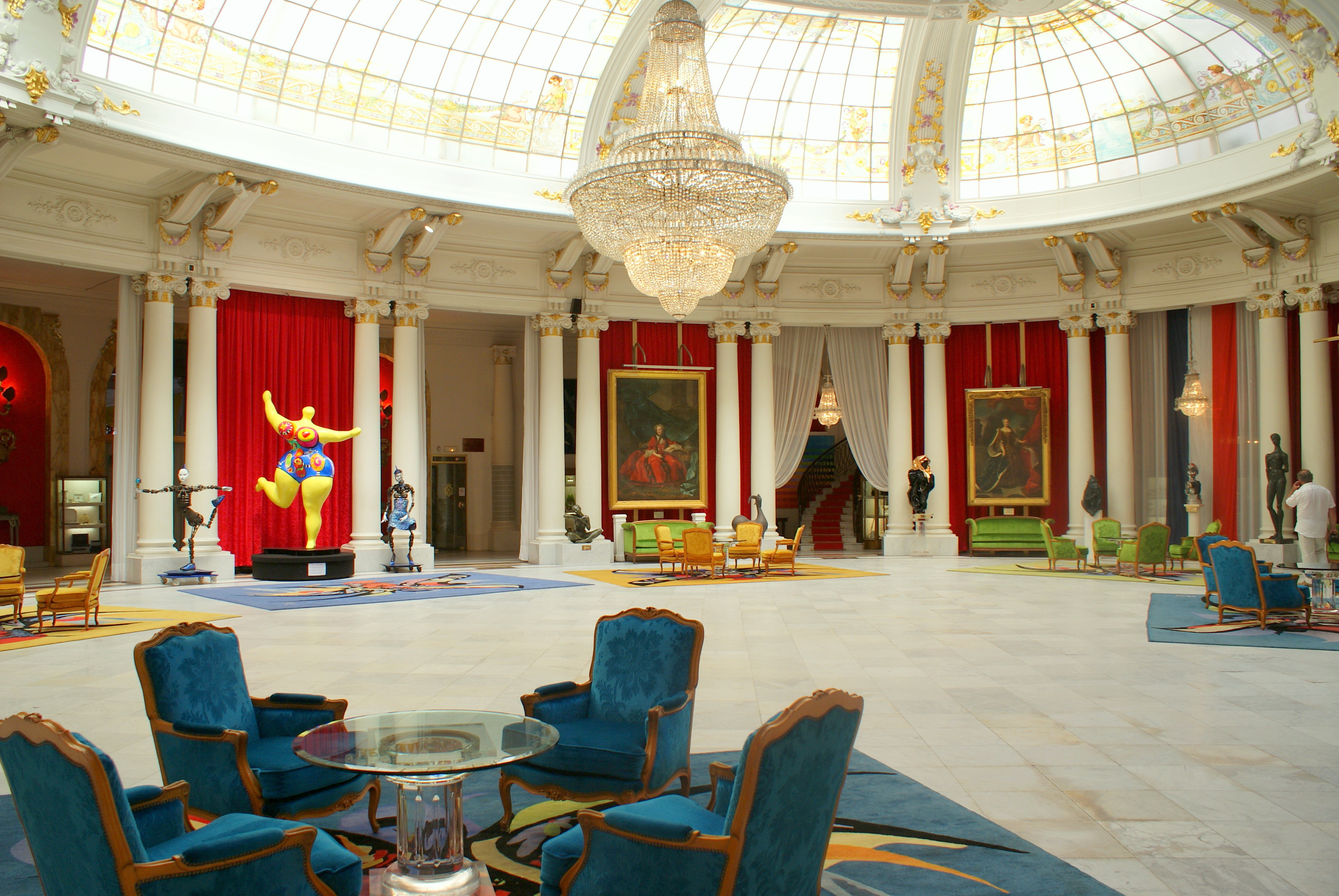 hall du négresco, avant les travaux, juillet 2009